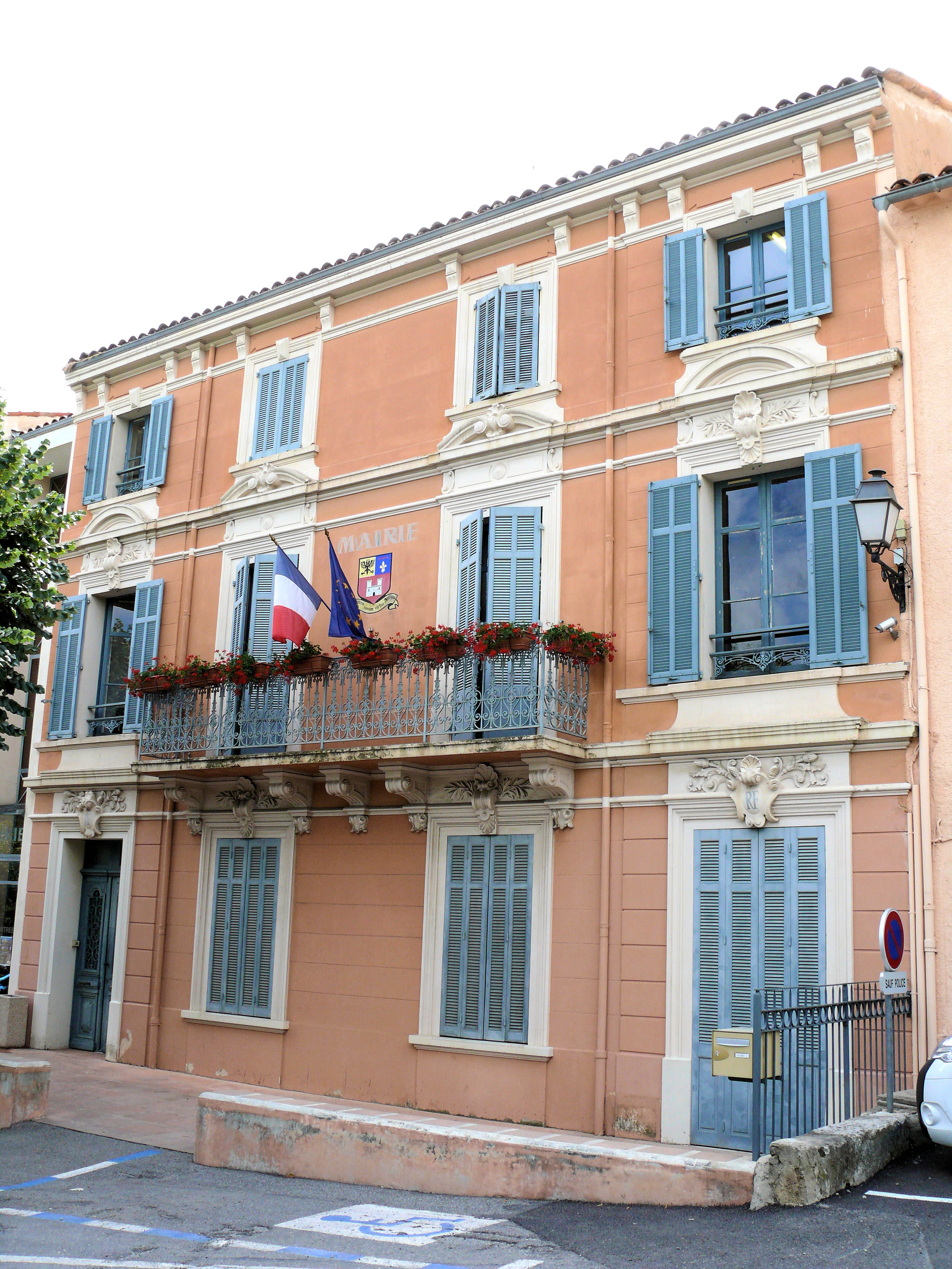 Châteauneuf-Grasse - La mairie, place du Bosquet